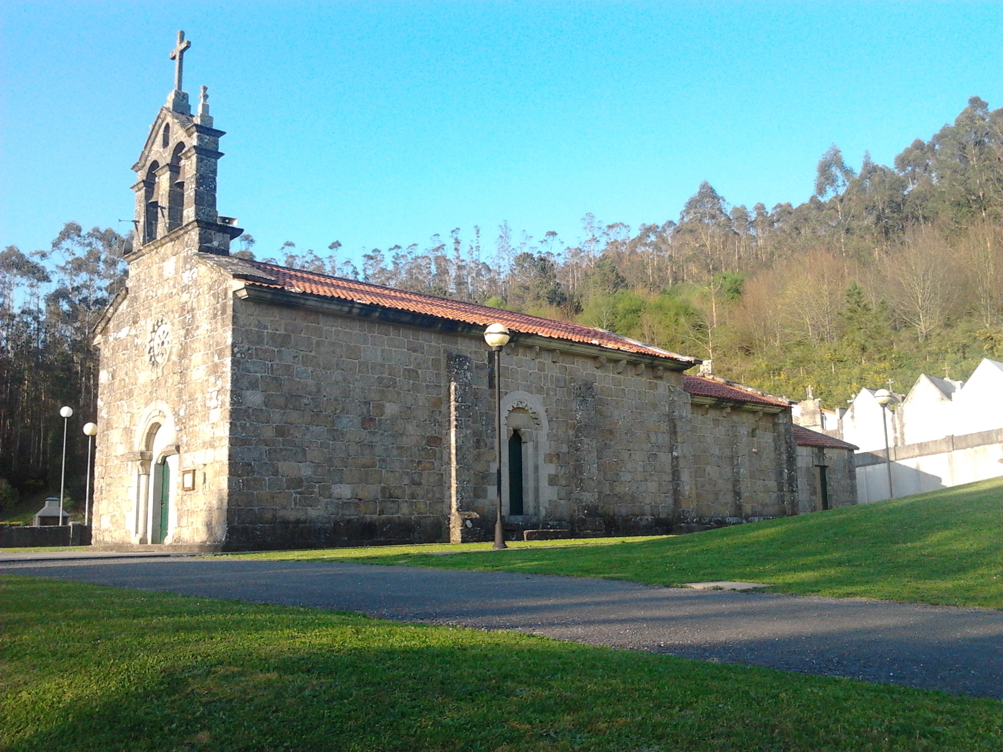 Igrexa de San Román das Encrobas, Cerceda